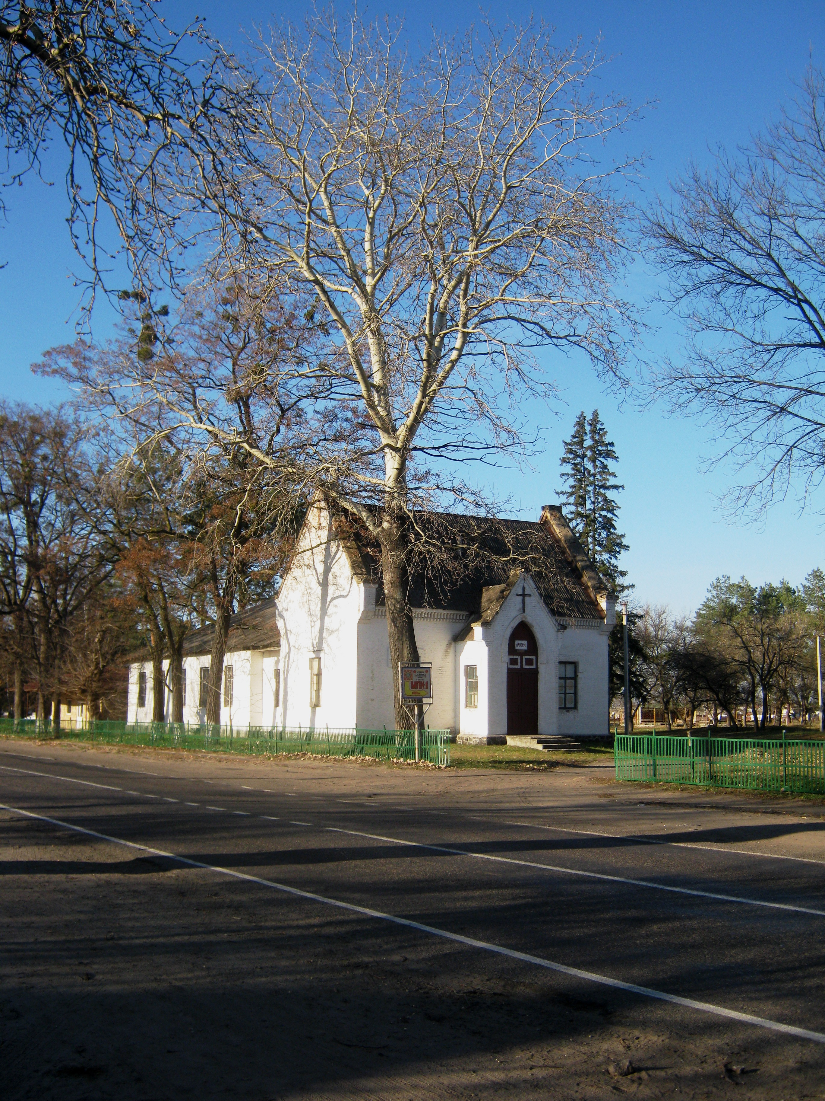 Колишній сільський клуб у селищі Мошни (Черкаська область, Україна), побудований у 1918 році